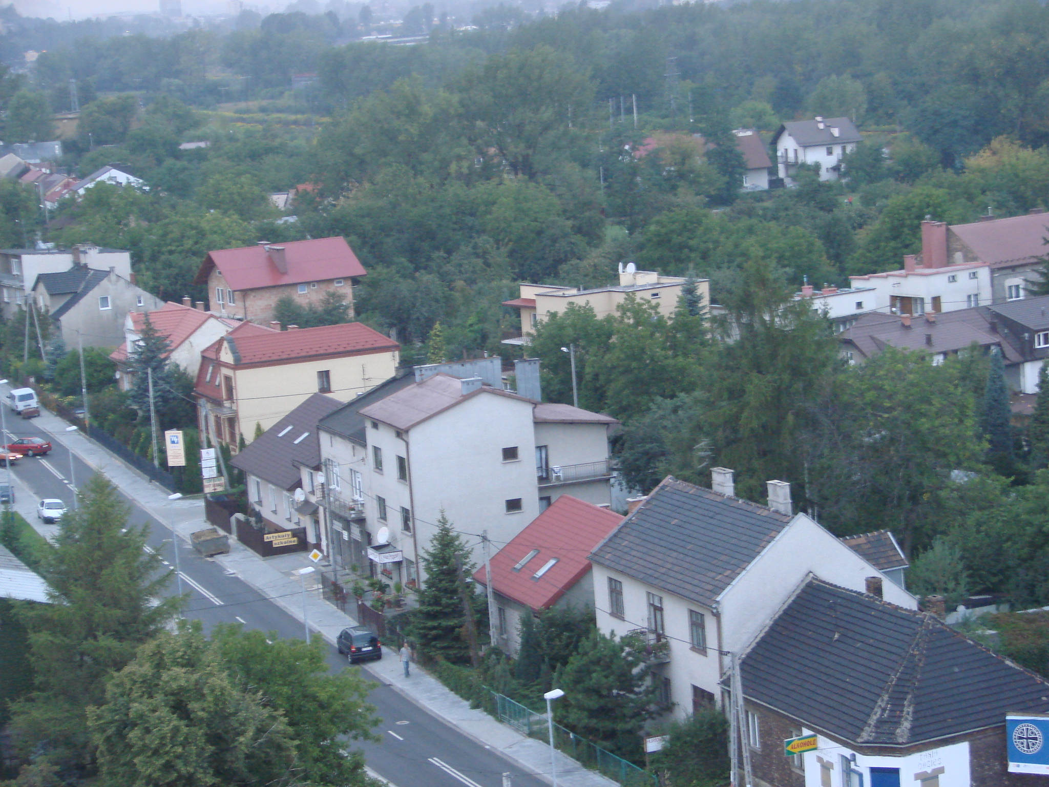 Prokocim - Widok na ul. Bieżanowską z okien bloku 78.